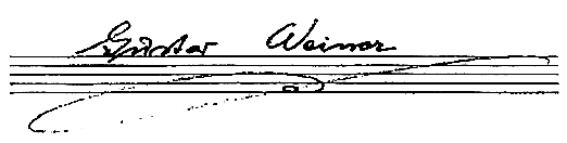 Unterschrift auf Notenpapier